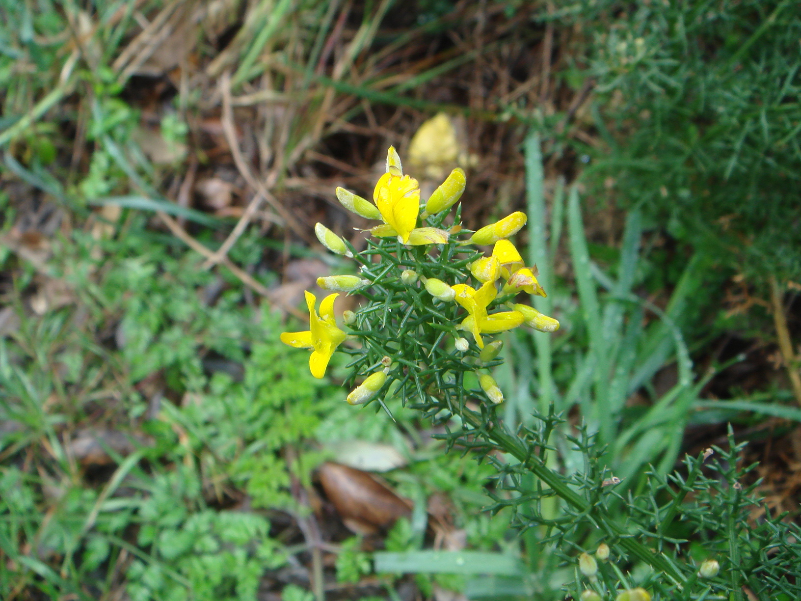 Aulaga (Stauracanthus boivinii), Ceuta, España